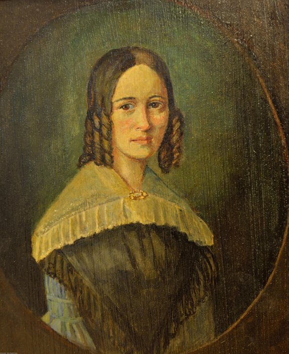 Bildnis der Marie Hassenpflug; unbekannter Maler; Historisches Museum Hanau Schloss Philippsruhe / Hanauer Geschichtsverein 1844 e.V.